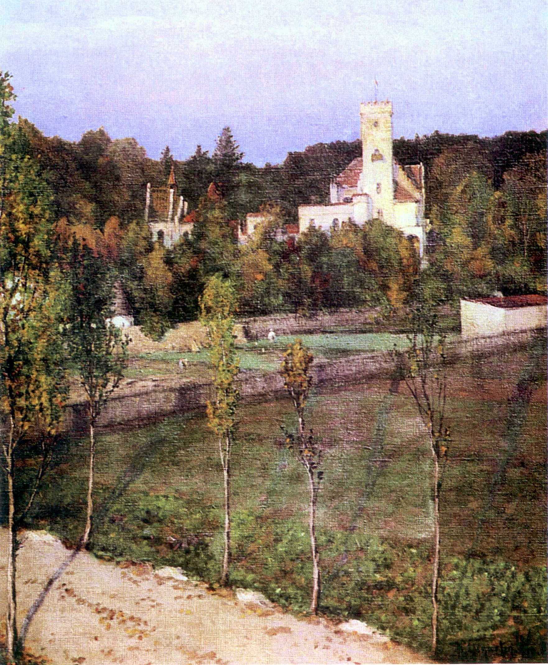 Das Hauser-Schloss Waldeck (Schloss Allach) von Westen gesehen. Ölgemälde von Heinrich Gogarten.